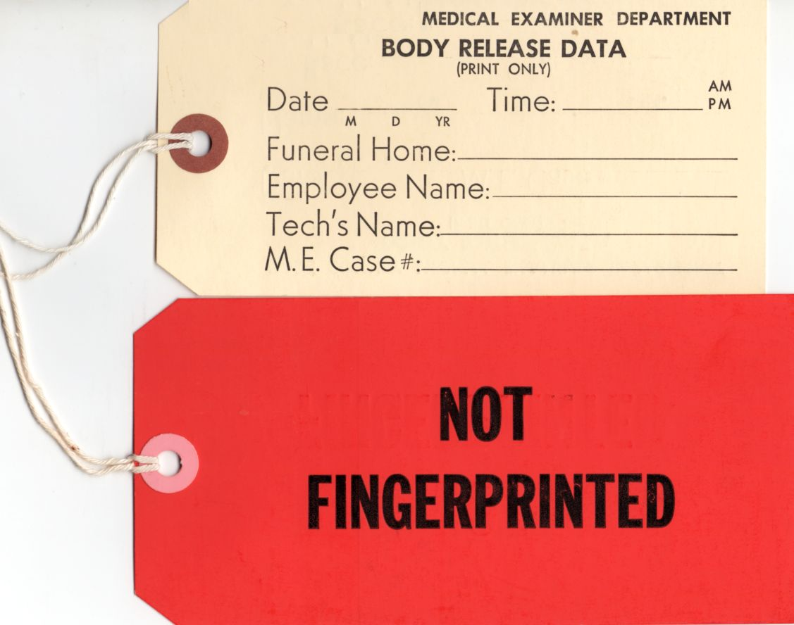 Etiquetes emprades en una morgue